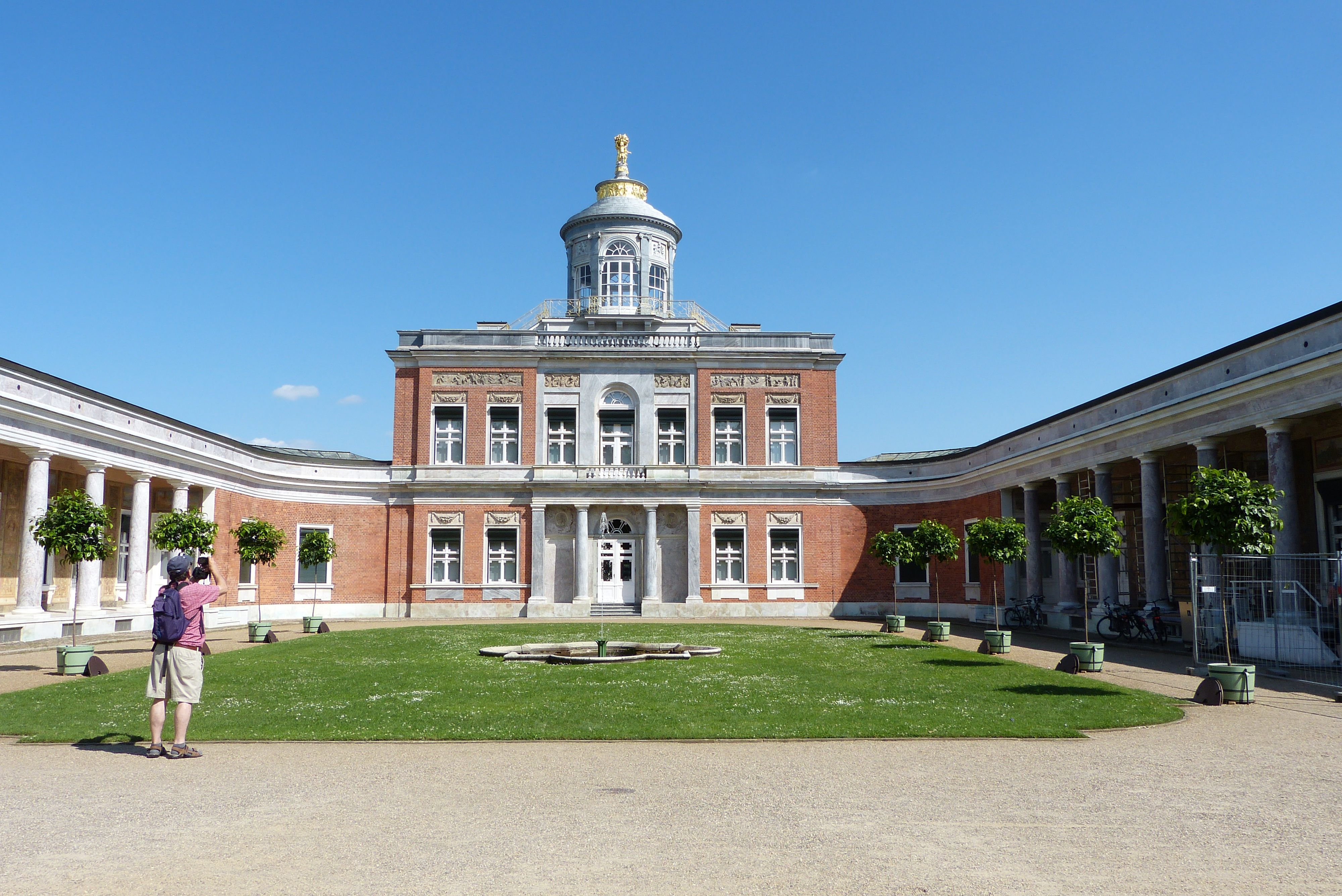 Potsdam, Marmorpalais im Neuen Garten